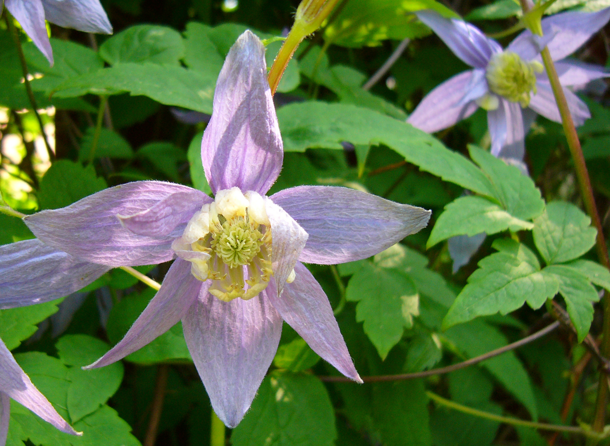 Clematis macropetala, Monteliusvägen, Södermalm, Stockholm